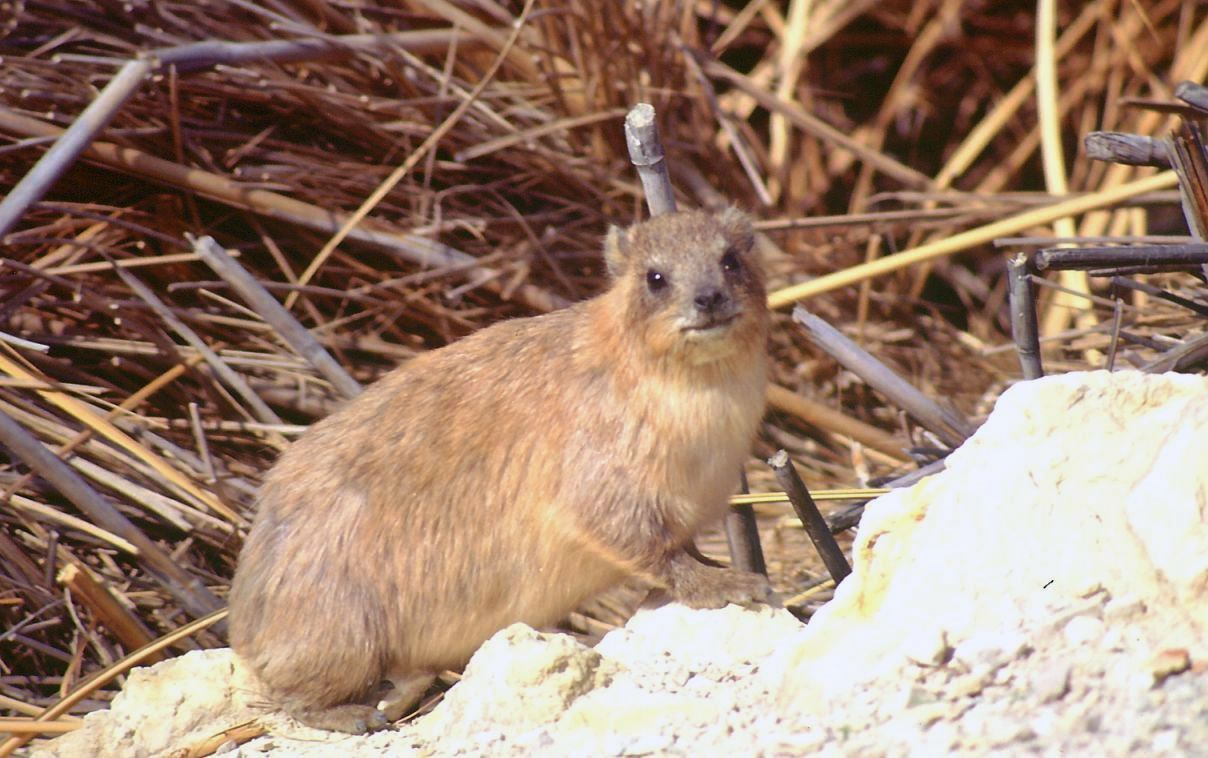 Klippschliefer